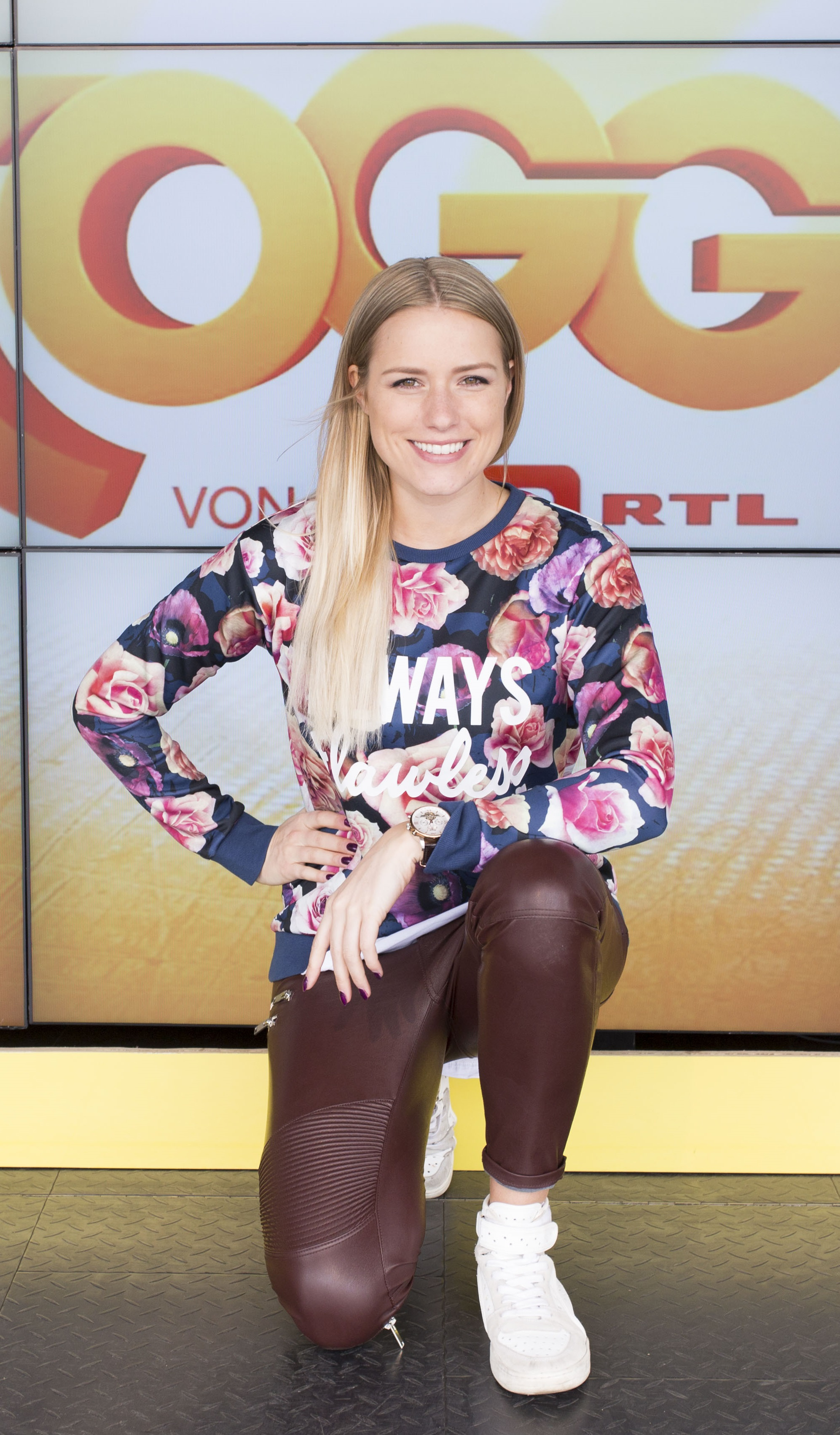 Vanessa Meisinger bei der SuperRTL Toggo Tour 2015 in Köln